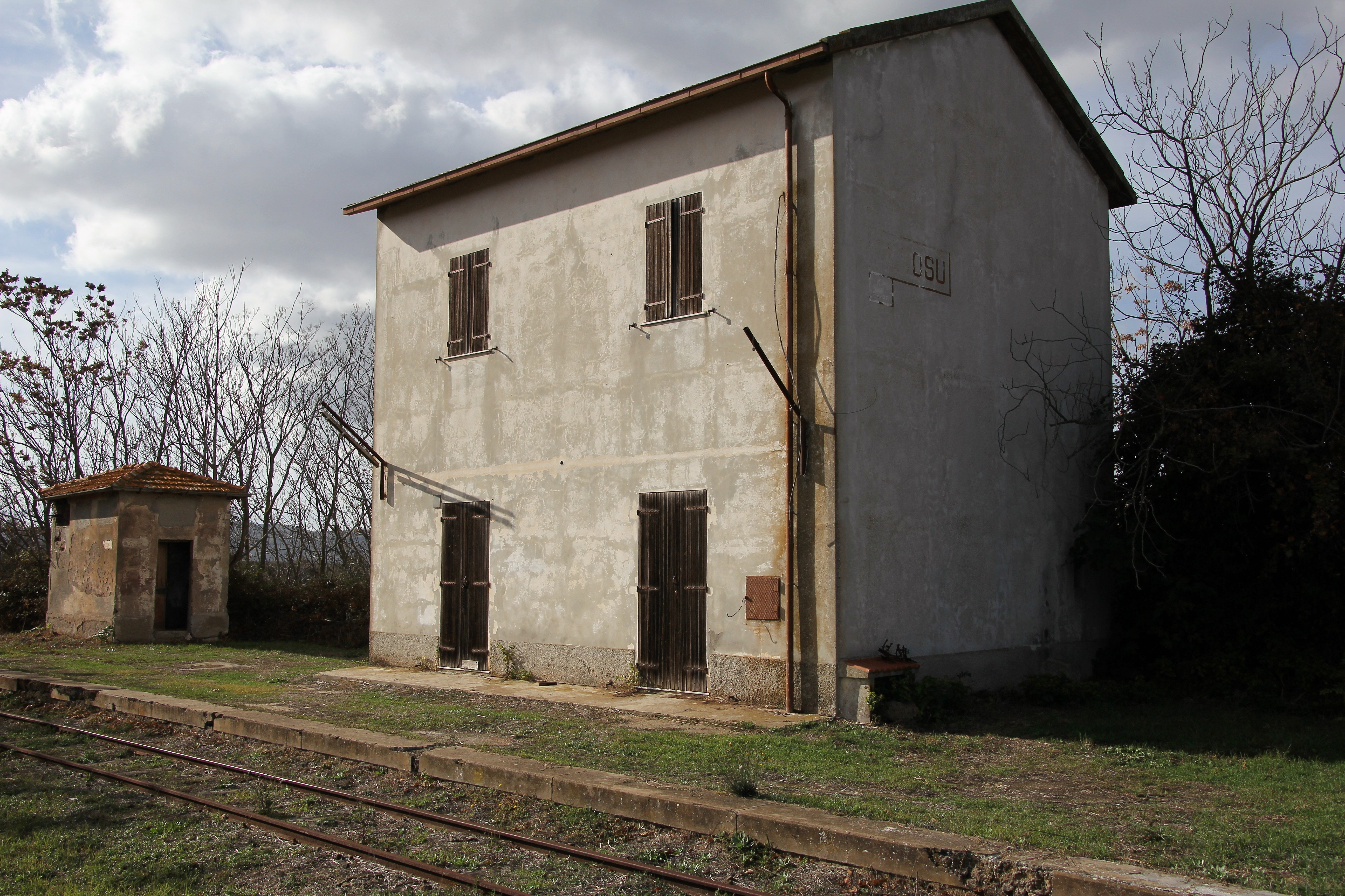 Ploaghe, stazione ferroviaria di Fenosu